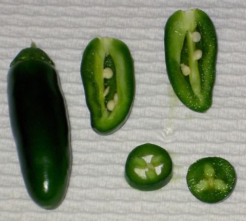 Jalapeno peppers